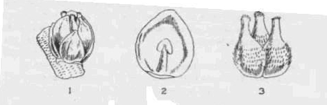 Zeichnung der weiblichen Blüte einer T. fortunei